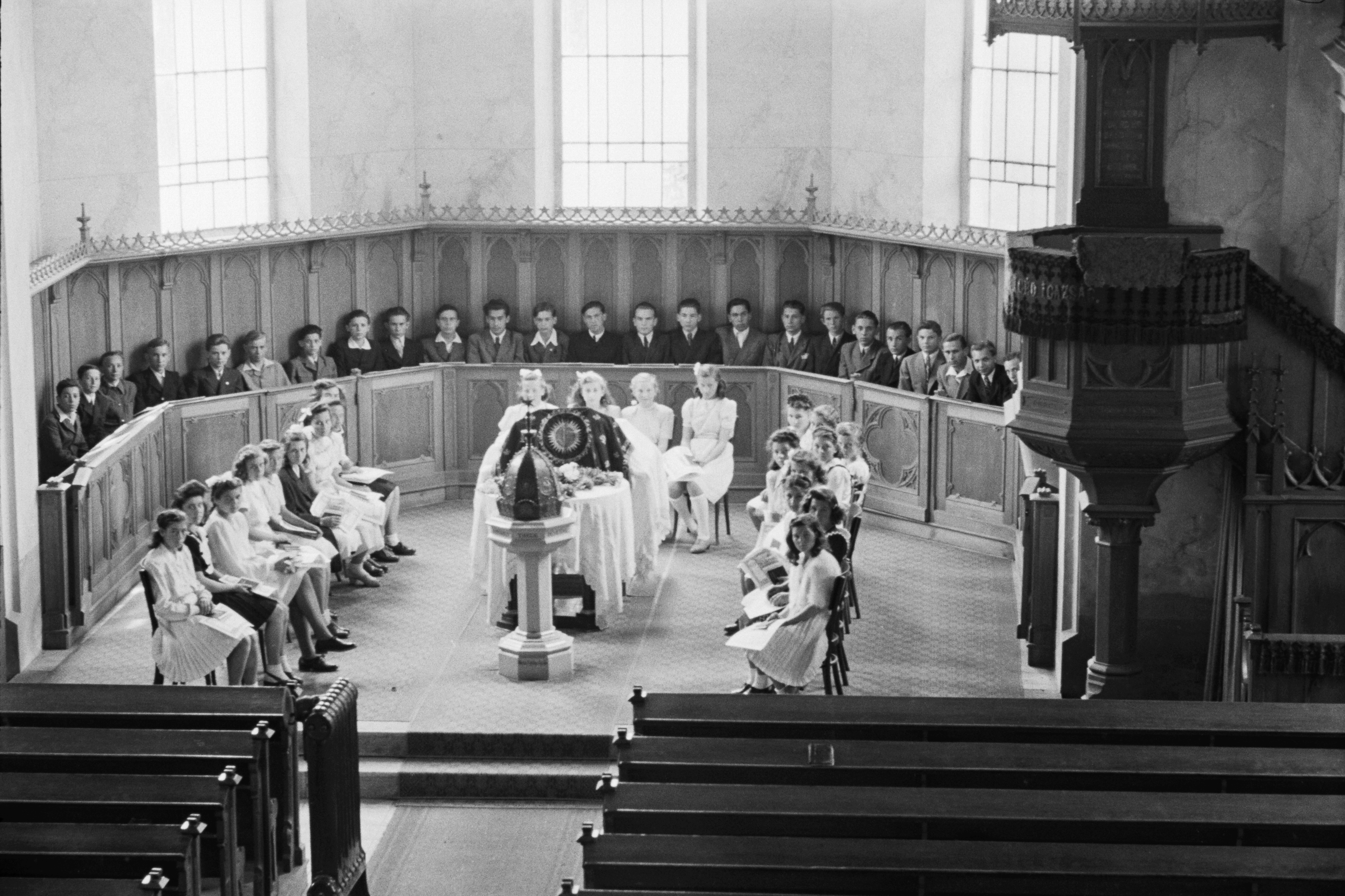 Kossuth utcai református templom. Location: Hungary, Győr Title: Kossuth utcai református templom.